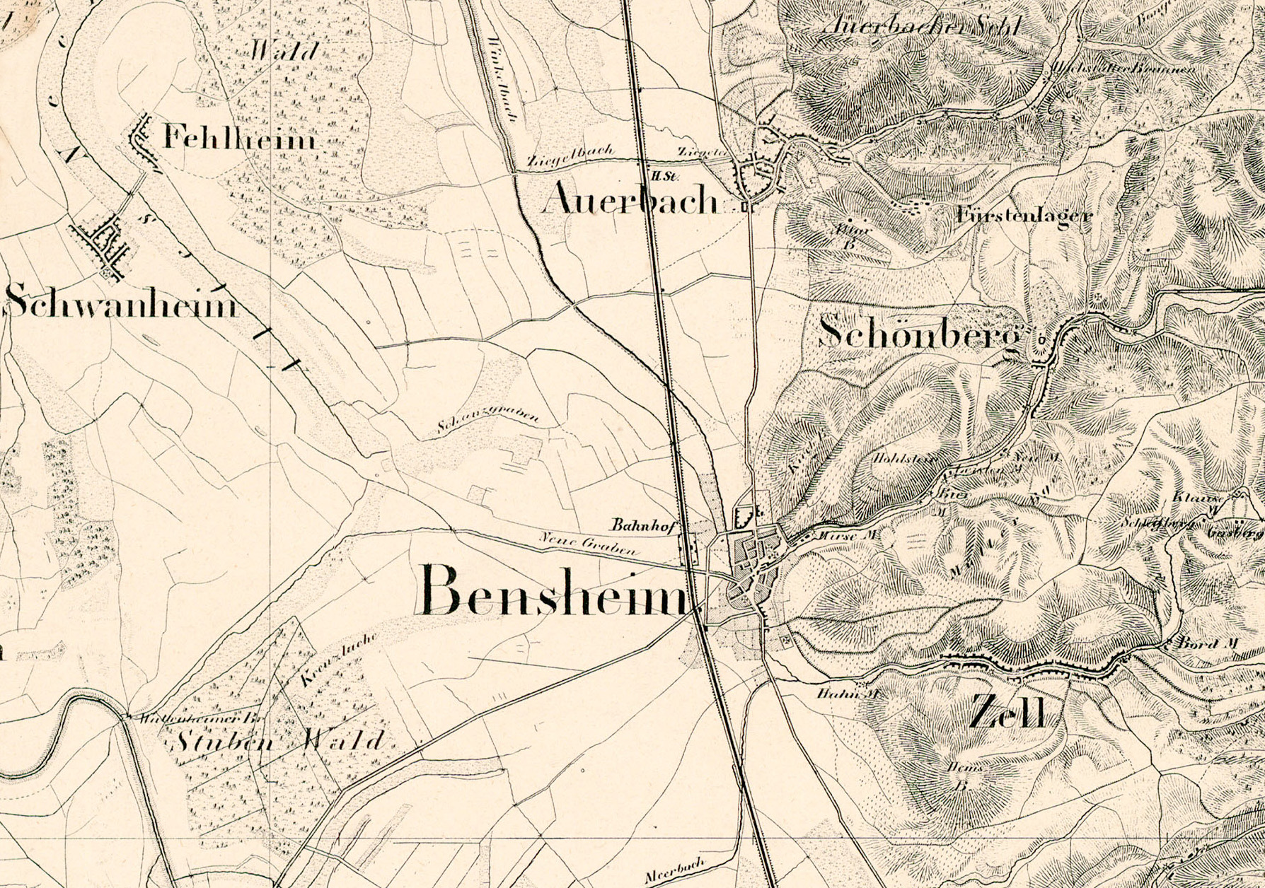 Historische Karte des Großherzogtums Hessen von 1832 bis 1850. Im Maßstab 1:50.000. Blatt 26: Worms. Ausschnitt mit Bensheim und einigen der heutigen Stadtteile (Auerbach, Fehlheim, Schwanheim, Zell und Schönberg)